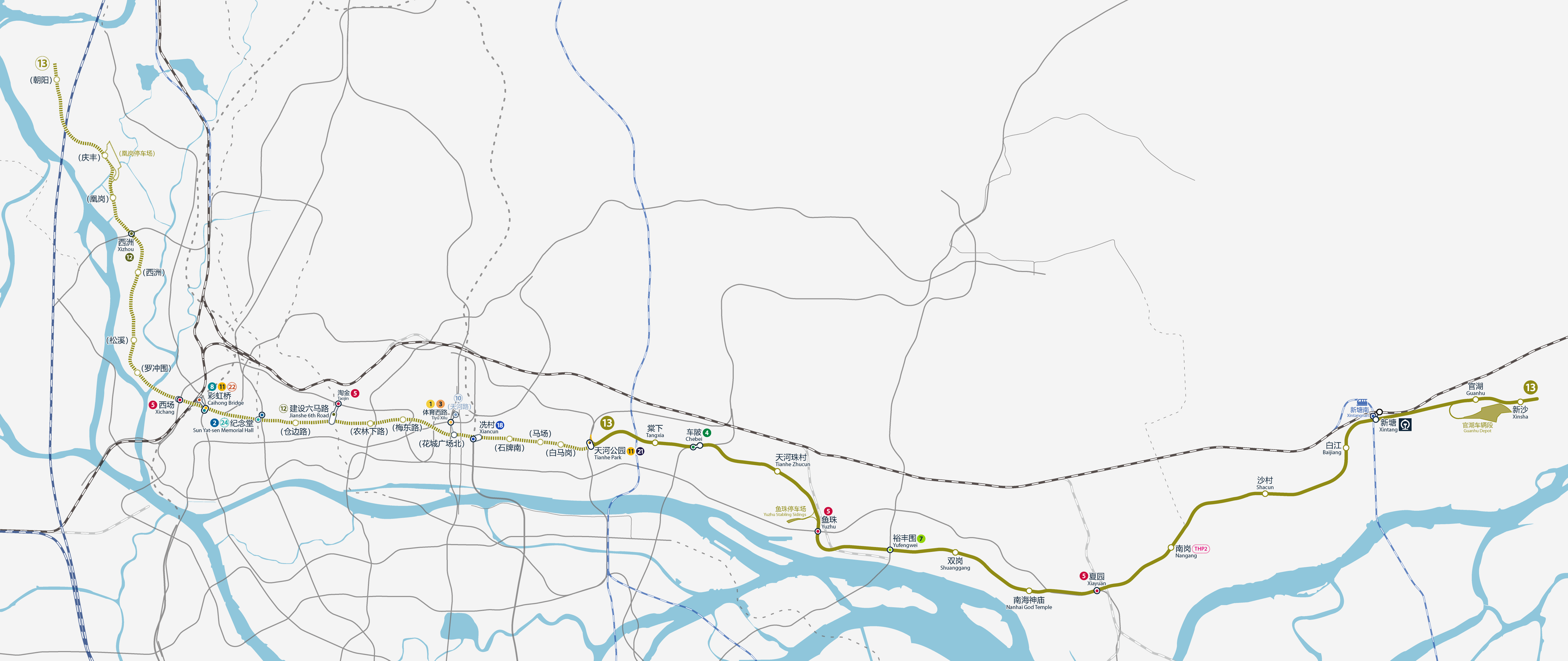 廣州地鐵13號線首期（魚珠~象頸嶺）路線圖，按真實走向比例繪畫